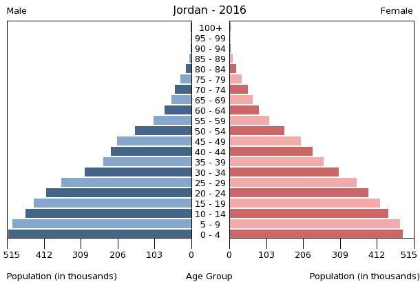 A population pyramid illustrates the age and sex structure of a country's population and may provide insights about political and social stability, as well as economic development. The population is distributed along the horizontal axis, with males shown on the left and females on the right. The male and female populations are broken down into 5-year age groups represented as horizontal bars along the vertical axis, with the youngest age groups at the bottom and the oldest at the top. The shape of the population pyramid gradually evolves over time based on fertility, mortality, and international migration trends.